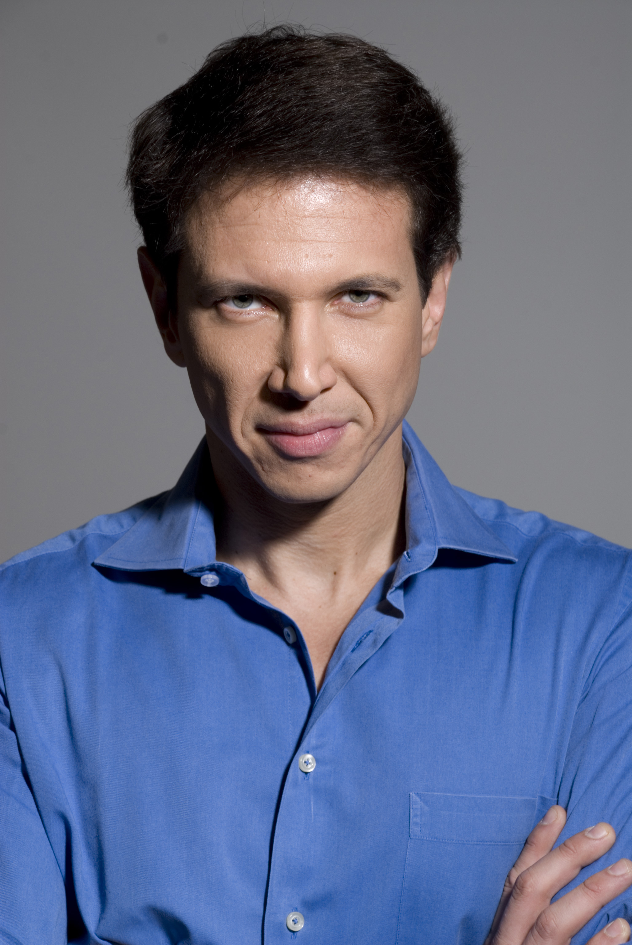 רונן ברגמן